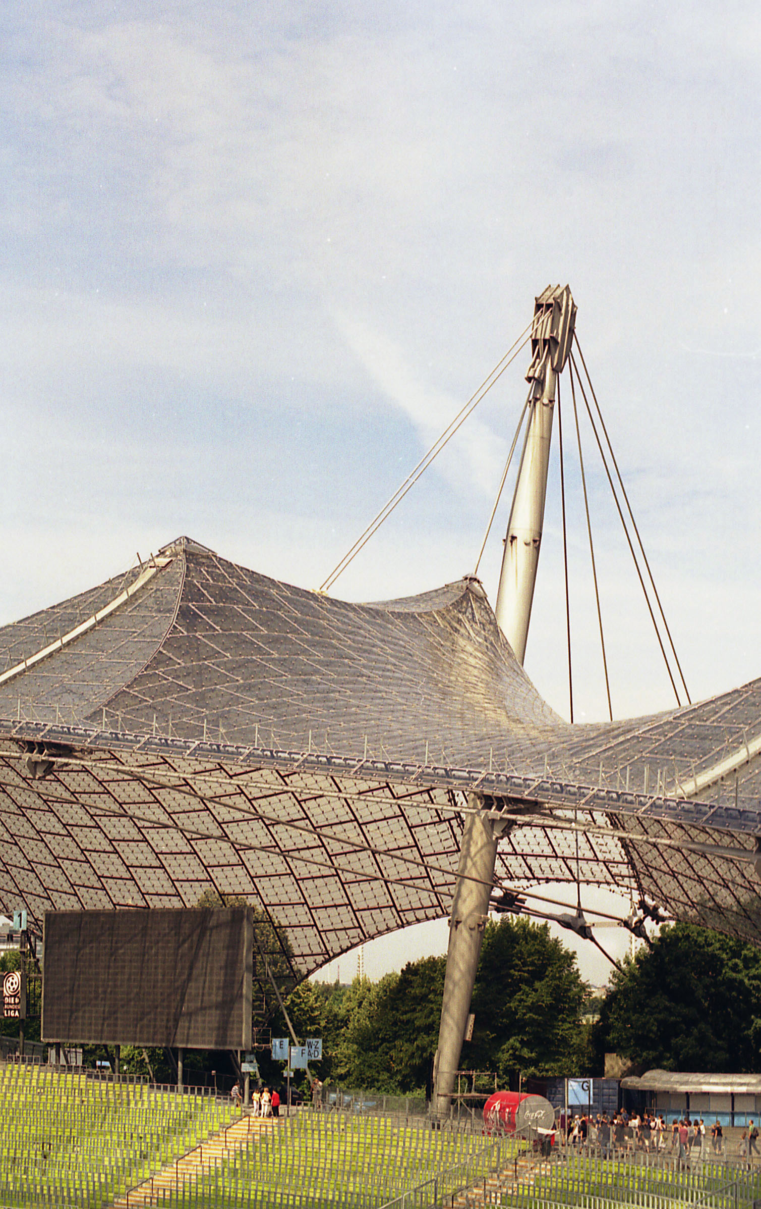 I cavi di sollevamento della coprtura